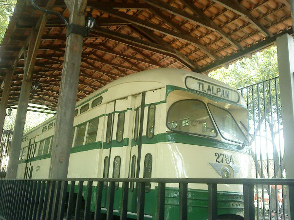 Un tranvía en el Museo del STE-DF, en el depósito Tetepilco. Se trata de un tranvía PCC, el panel de destino dice "Tlalpan".